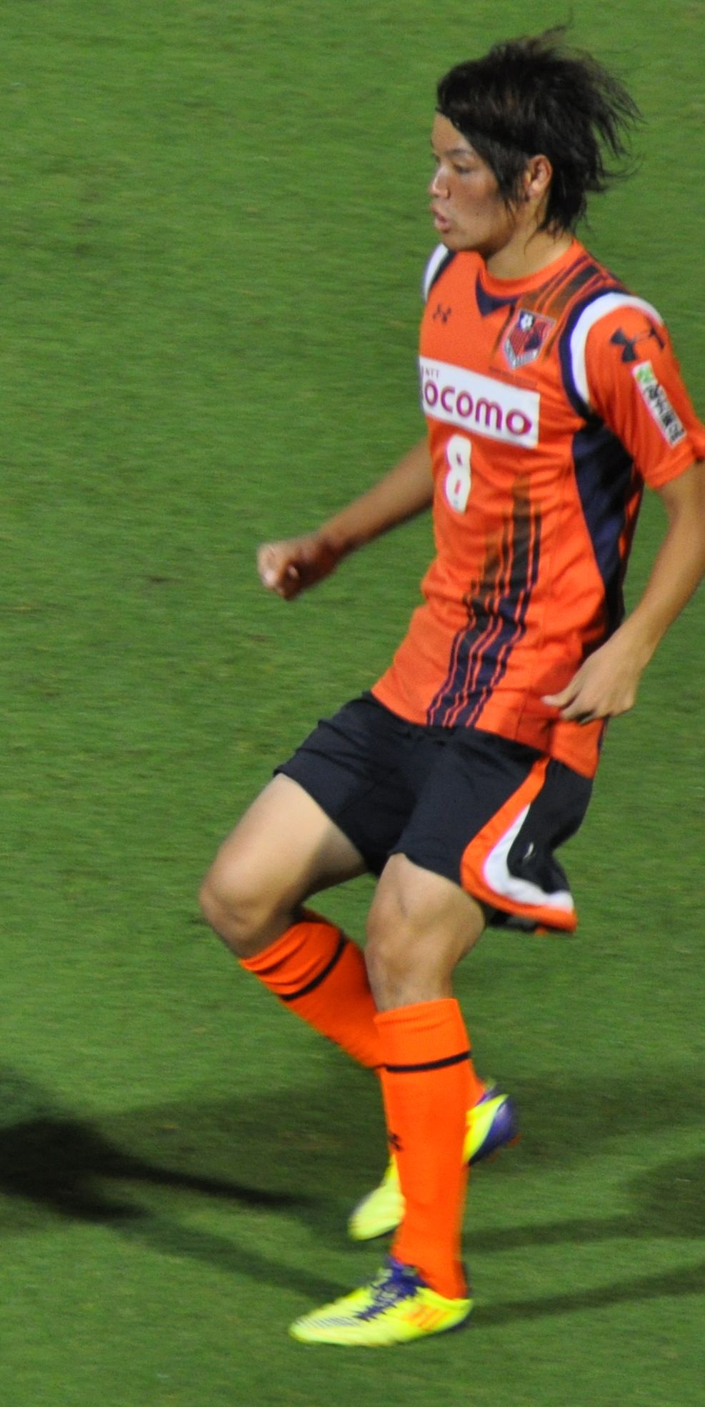 Keigo Higashi cropped from 2011.07.10 Omiya Ardija 2-3 Gamba Osaka_176